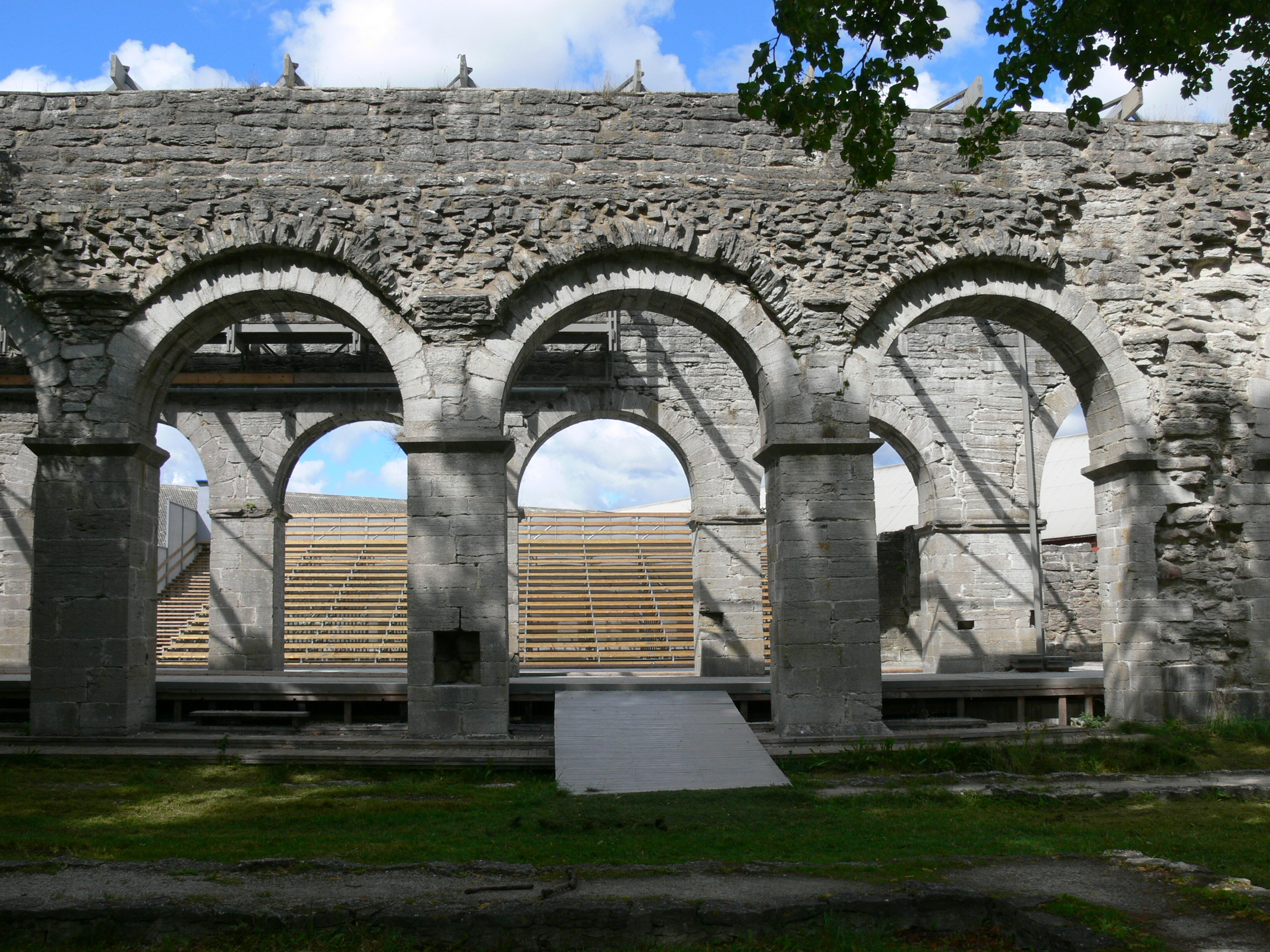 Roma kloster auf Gotland. Ruine der Klosterkirche von 1164 mit Freilichttheater